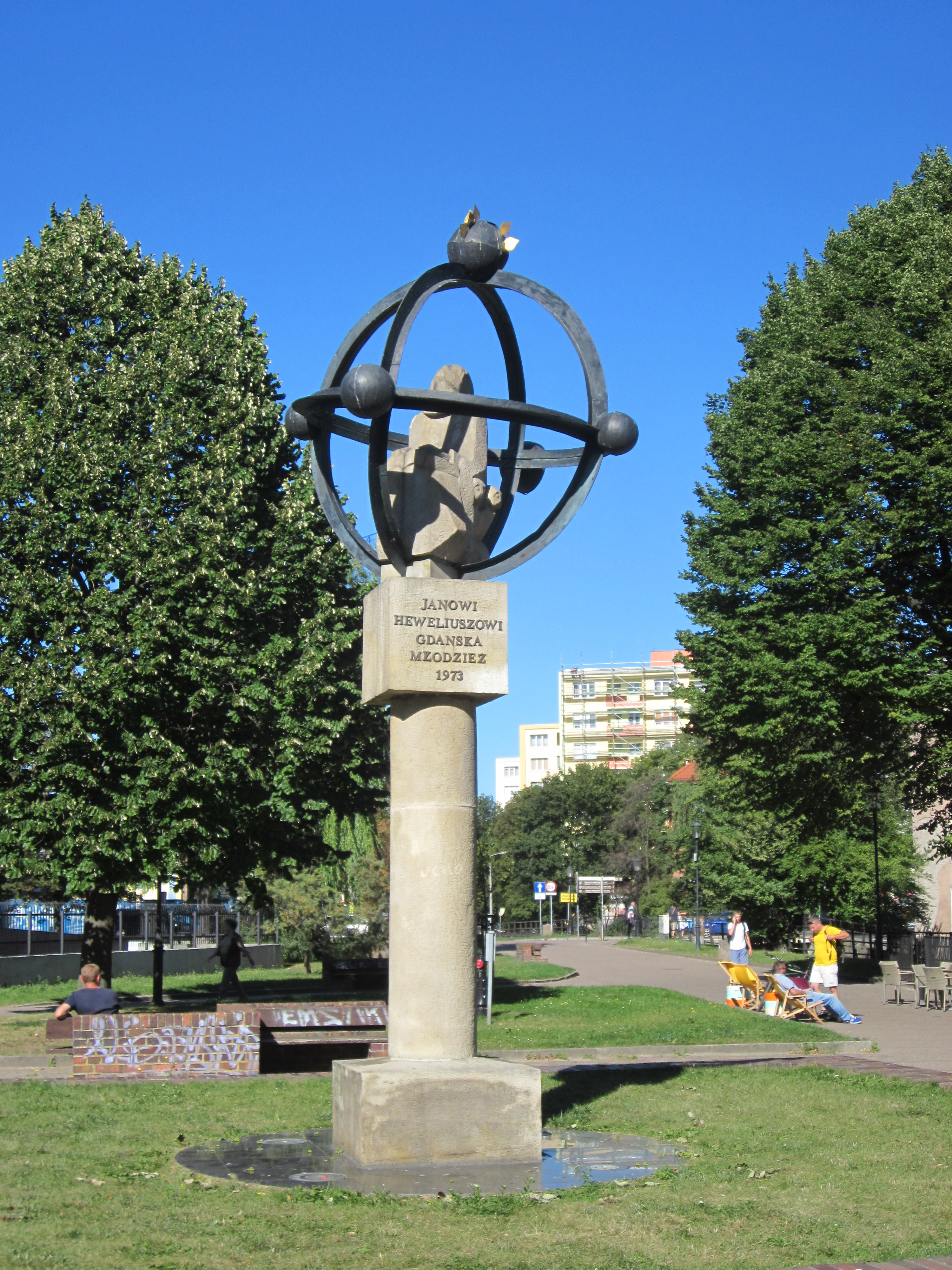 Die Heweliuszsäule in Danzig ist eines der vielen Denkmäler für den Astronomen in Danzig und wurde 1973 aufgestellt. Seit 2004 steht es in der ulica Wodopój.